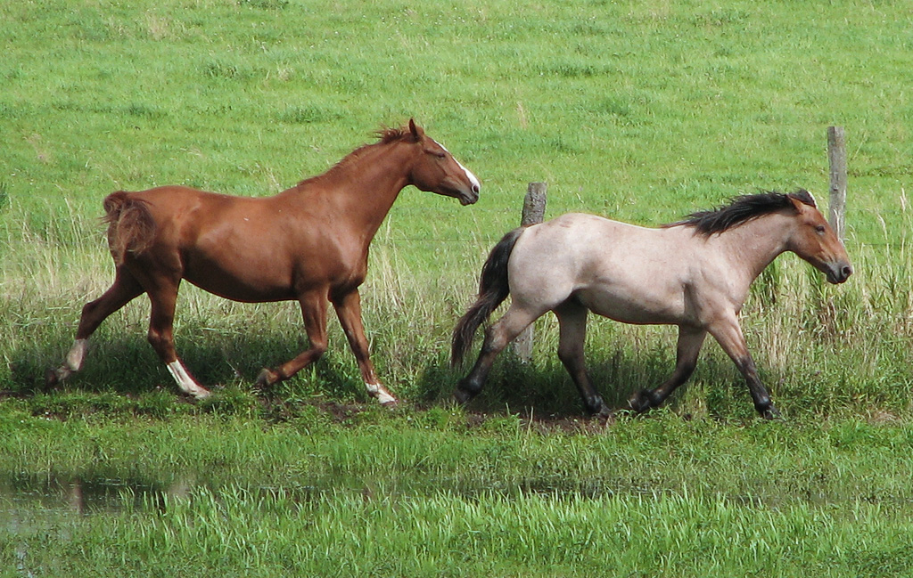 Beschreibung: Pferde im Trab Other Versions: Image:Pferde im Galopp.jpg, Image:RedRoan.jpg Fotograf: Darkone, 14. August 2005